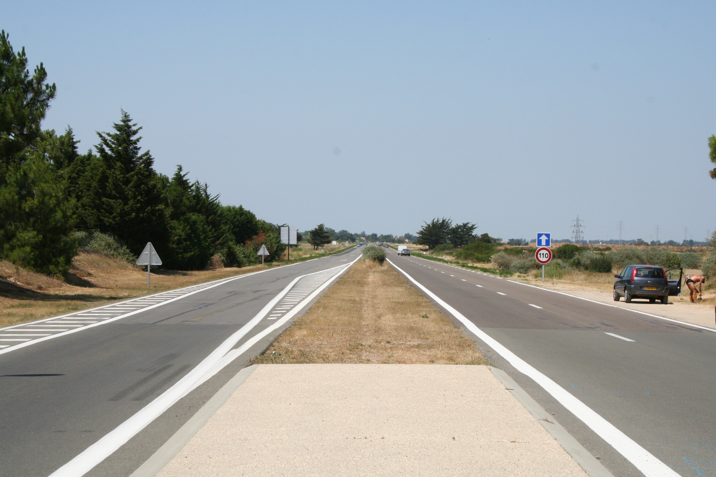 Photo de la voie rapide de l'ile de Noirmoutier